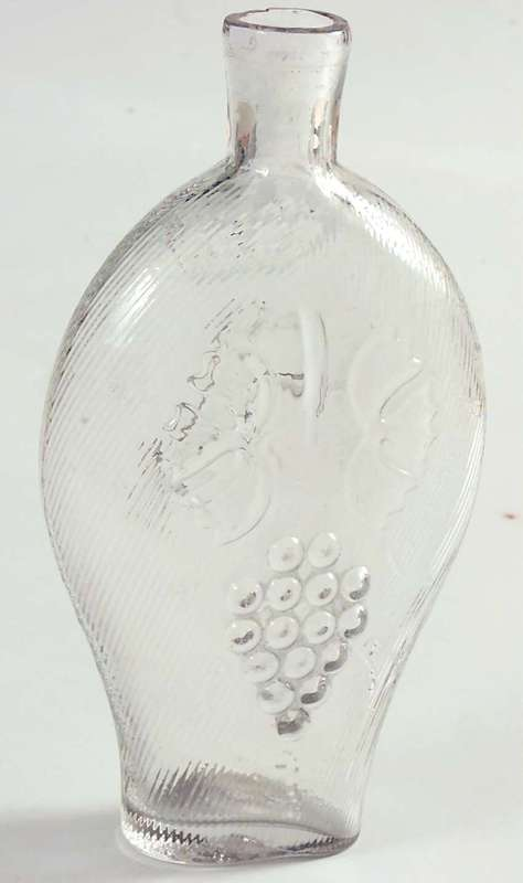 Løveflaske dekorert med drueklase fra Åsnes Glassverk i Namdalen. H. 19. cm. Foto Anne-Lise Reinsfelt/Norsk Folkemuseum, NF.1930-0554.